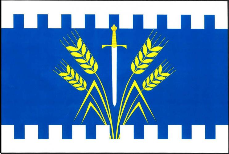 vlajka, Velké Všelisy, okres Mladá Boleslav